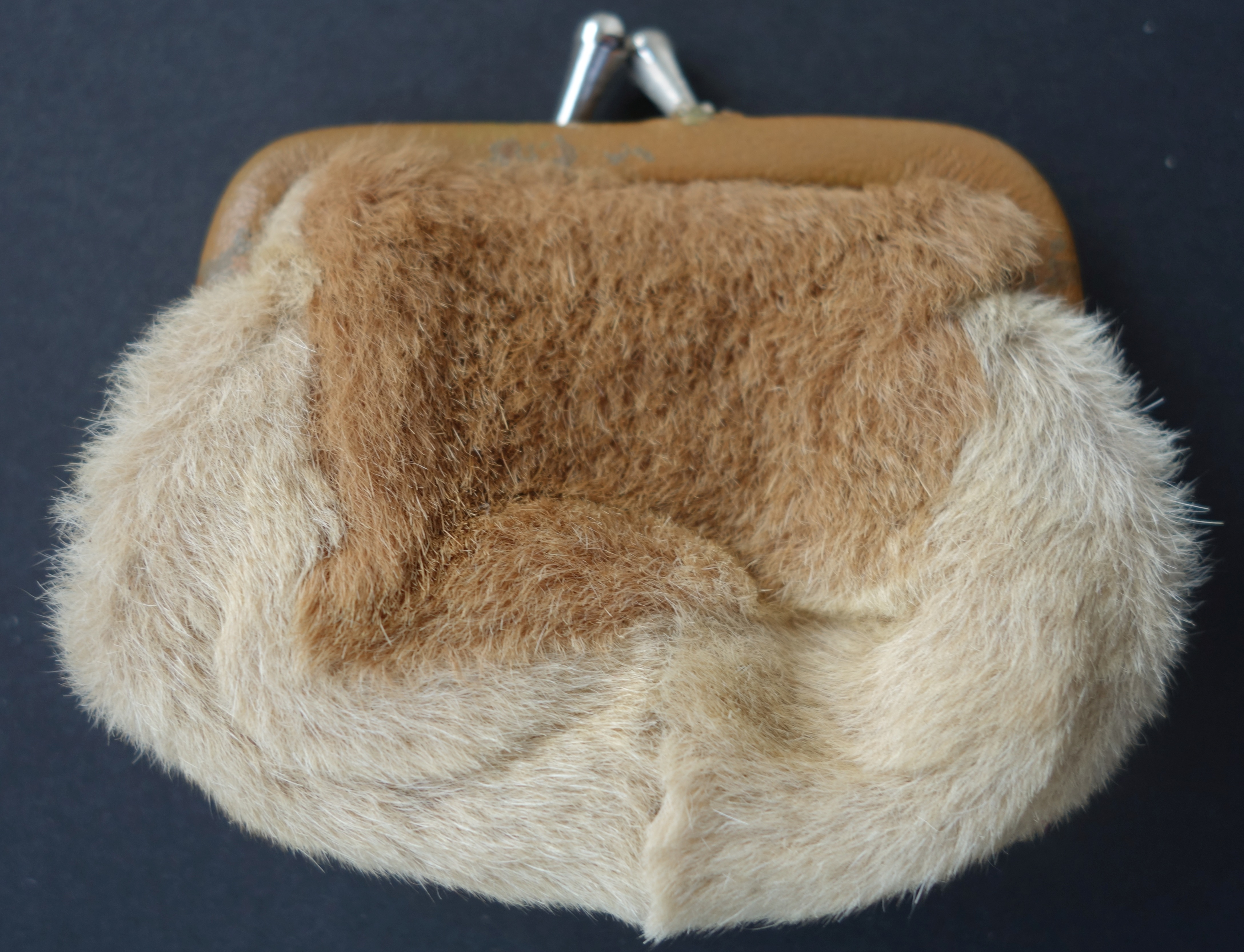 Geldtäschchen, 1950er Jahre, aus Kängurufell. Im Rauchwarenhandel werden die Felle aller Känguruarten jedoch als Wallabyfelle gehandelt, die Felle der eigentlichen Wallabys und die Jungtierfelle der meist größeren Kängurus. Ca. 9 cm breit, 7 cm hoch (plus Verschluss).